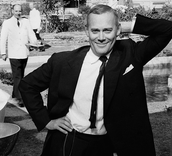 Tore Wretman på Stallmästaregården